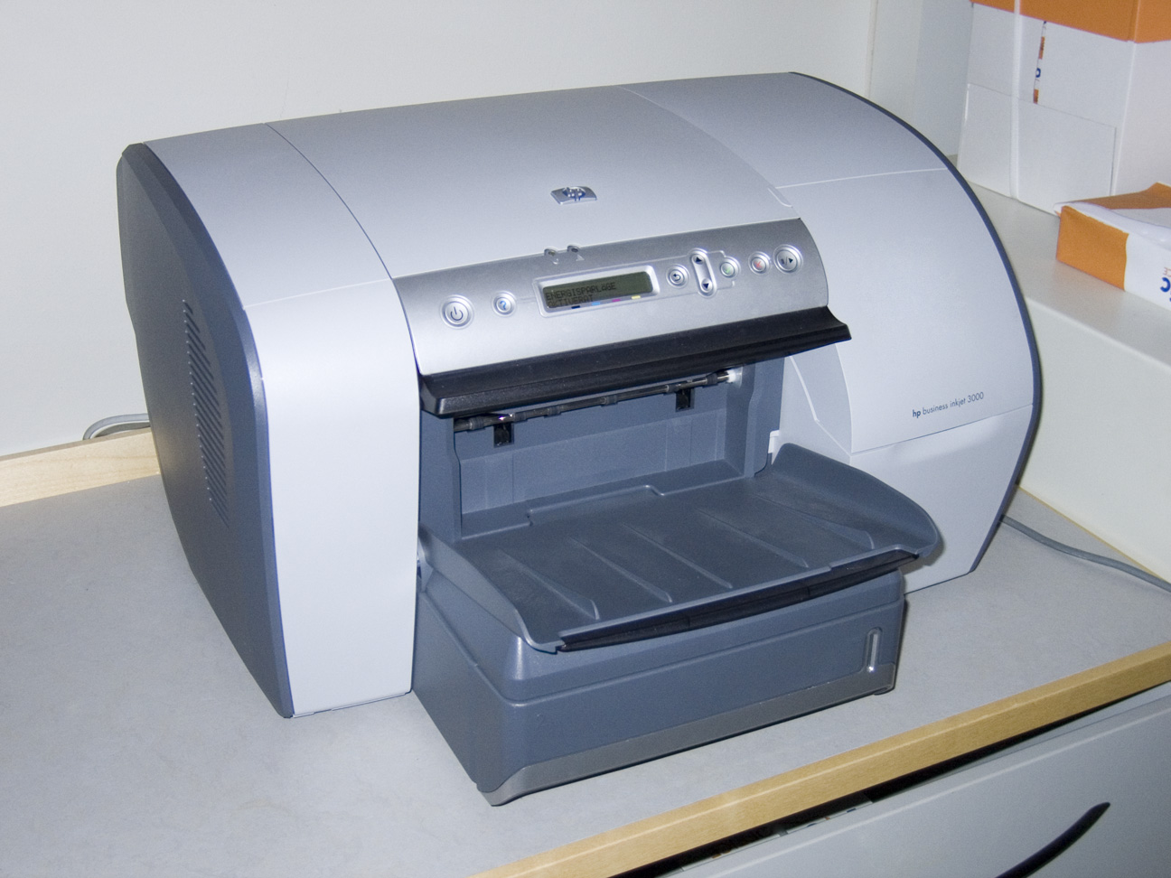 惠普inkjet3000打印机，顾震弘摄于2005年9月11日